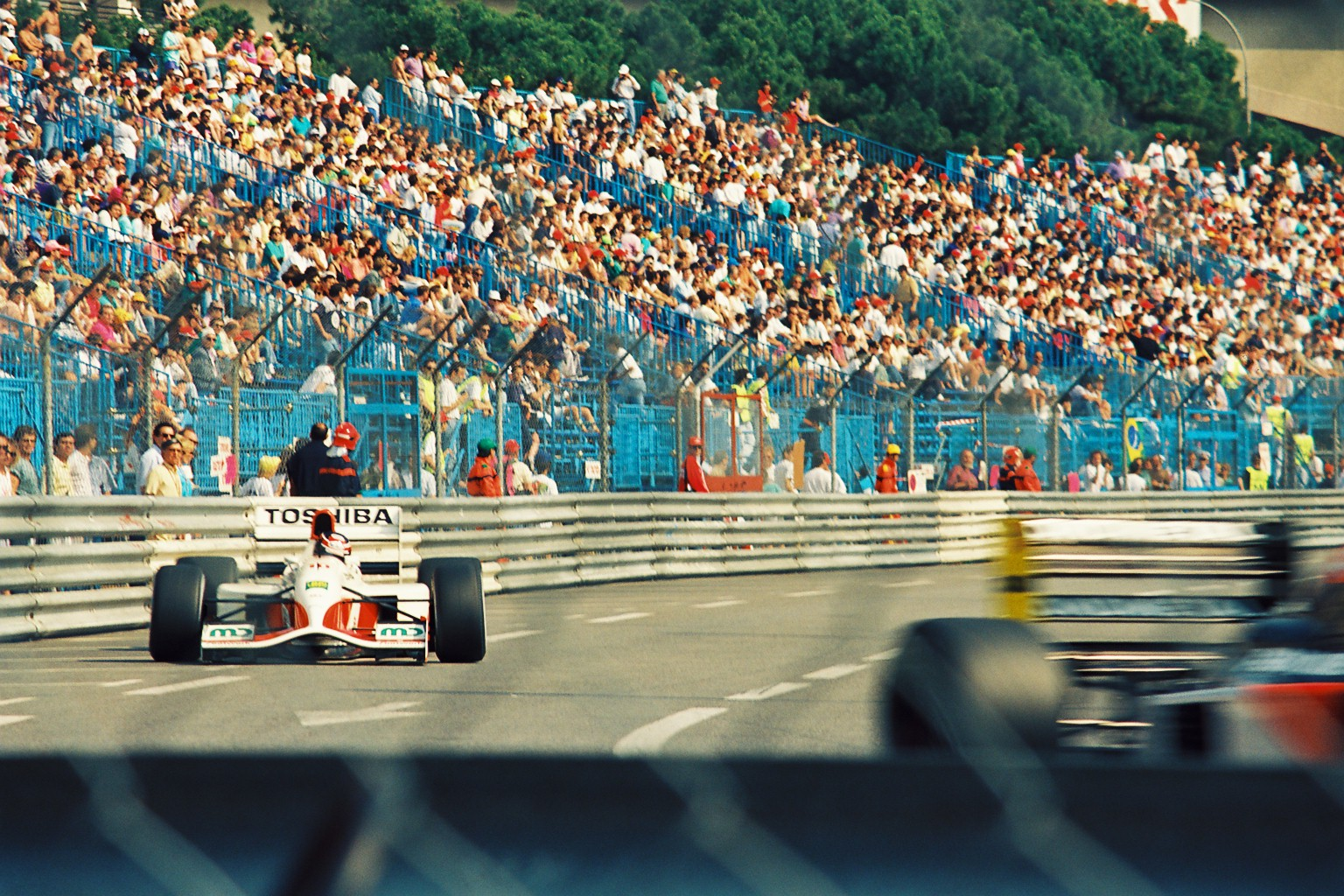 L'Arrows Footwork FA13 au Grand Prix de Monaco 1992.